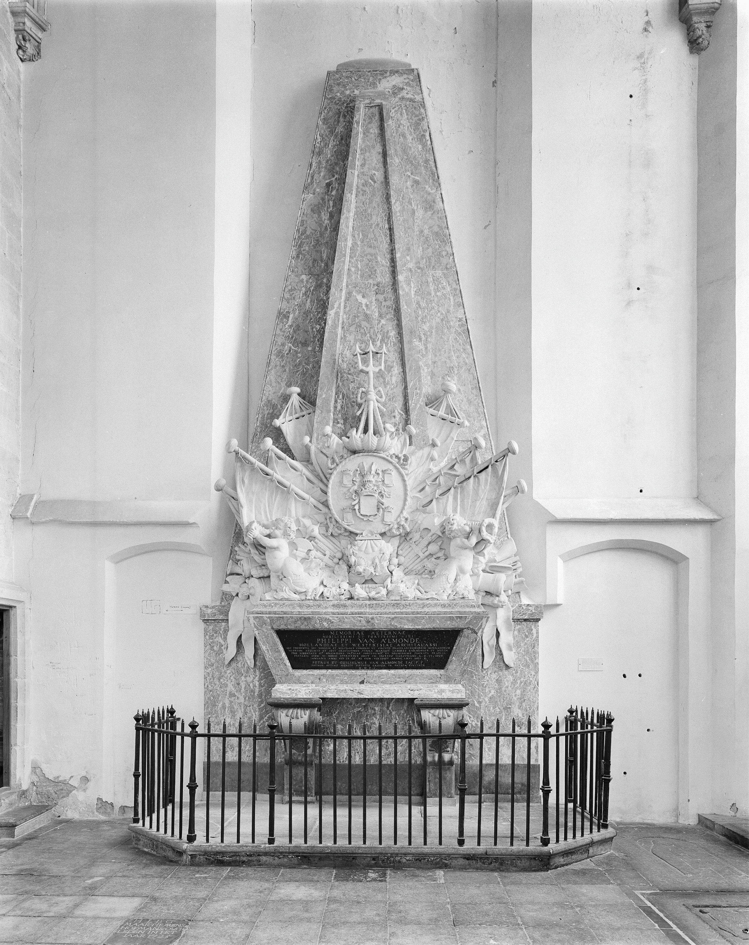 Grote kerk of Catharijnekerk: INTERIEUR, DETAIL: GRAFMONUMENT PHILIPS VAN ALMONDE, TEGEN WESTWAND NOORDERZIJBEUK